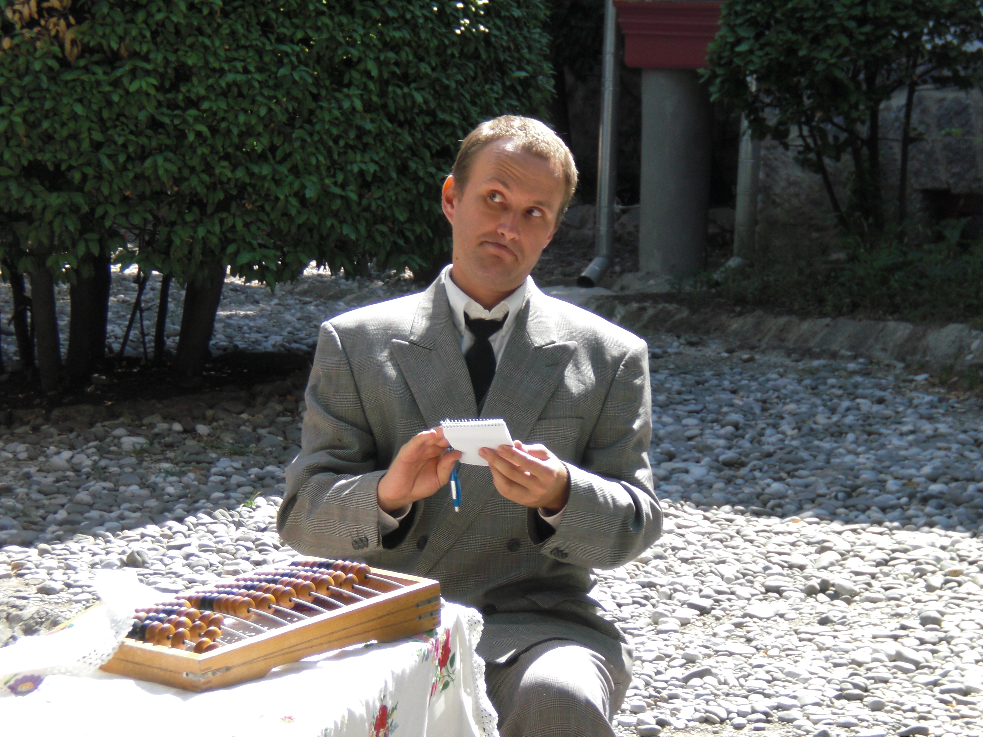 Teatraĵo "Размазня" (proksimume "nedecidema", "ĝenema") de Anton Ĉeĥov en esperantlingva prezento, montrata en Jalto dum la SAT-Kongreso en 2012 kun aktorado de Gurij Korniljev